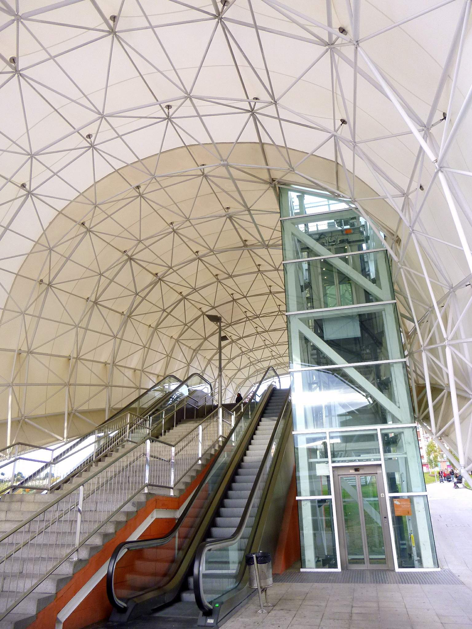 Estación de Metro de Astrabudua (Erandio, Vizcaya)